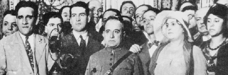 Cena da Revolução de 1930 (ao centro Getúlio Vargas).